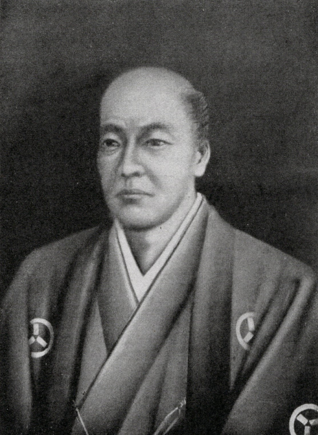 土佐藩家老・野中兼山良継の肖像画。